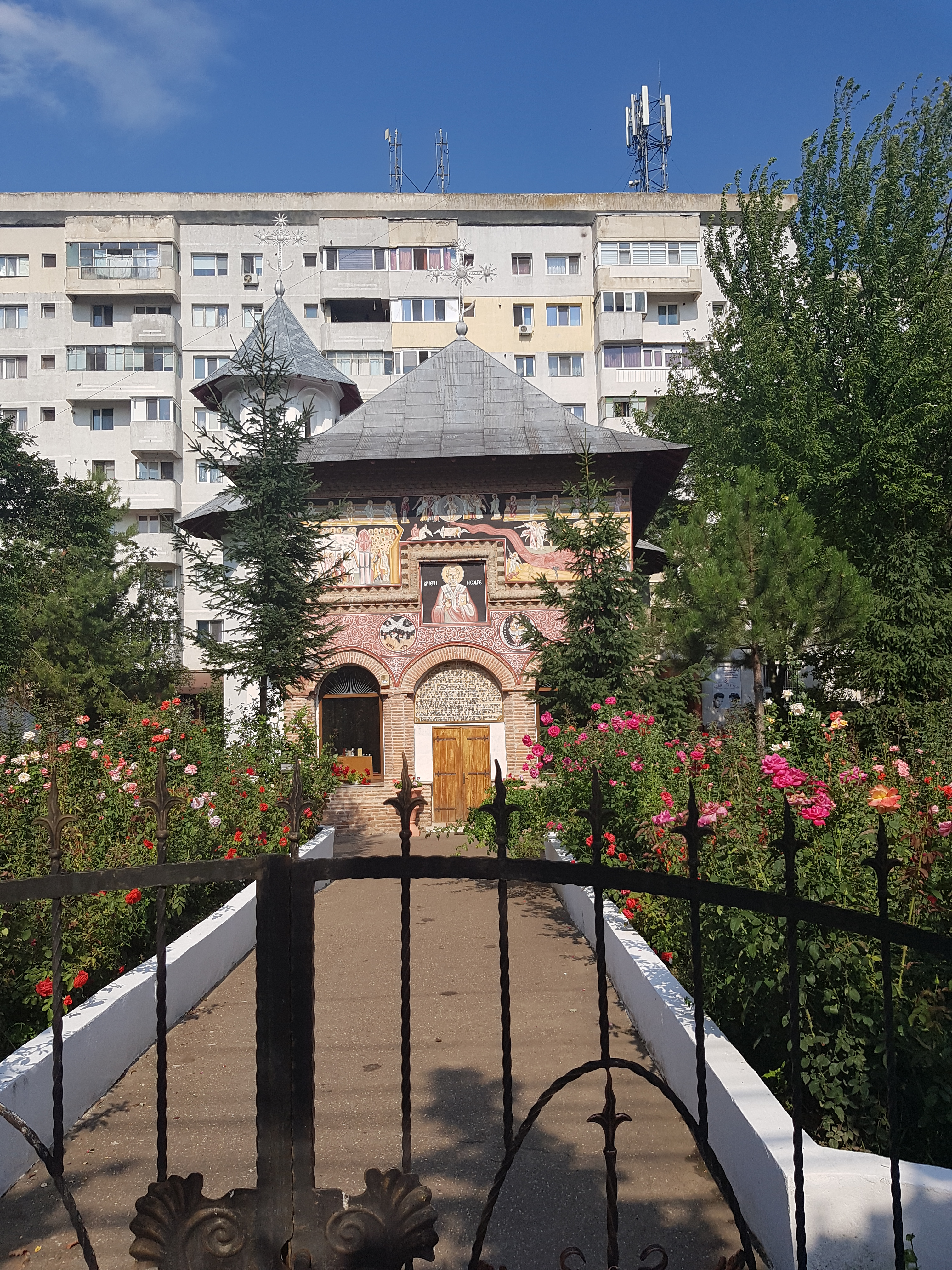 Biserica „Sf. Nicolae” - Nou